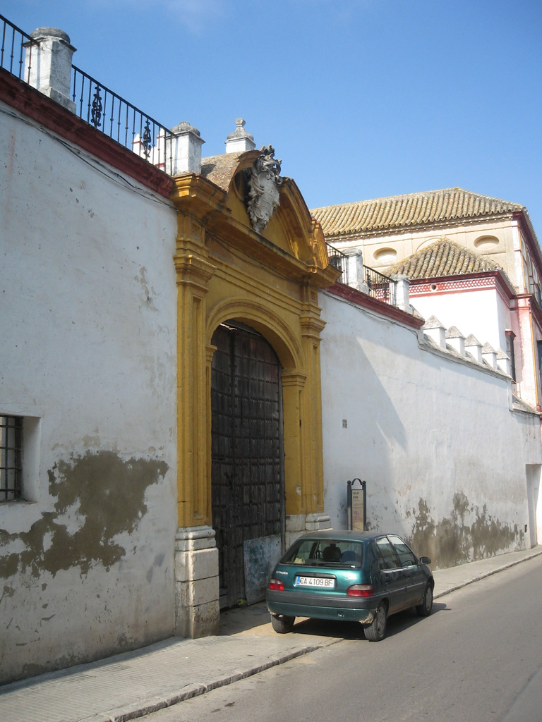 Fachada del apeadero de la Casa de Arizón en Sanlúcar de Barrameda